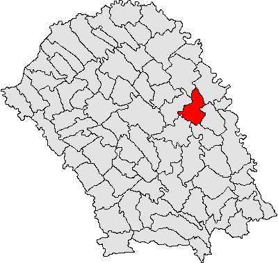 Categorie:Hărţi ale judeţului Botoşani